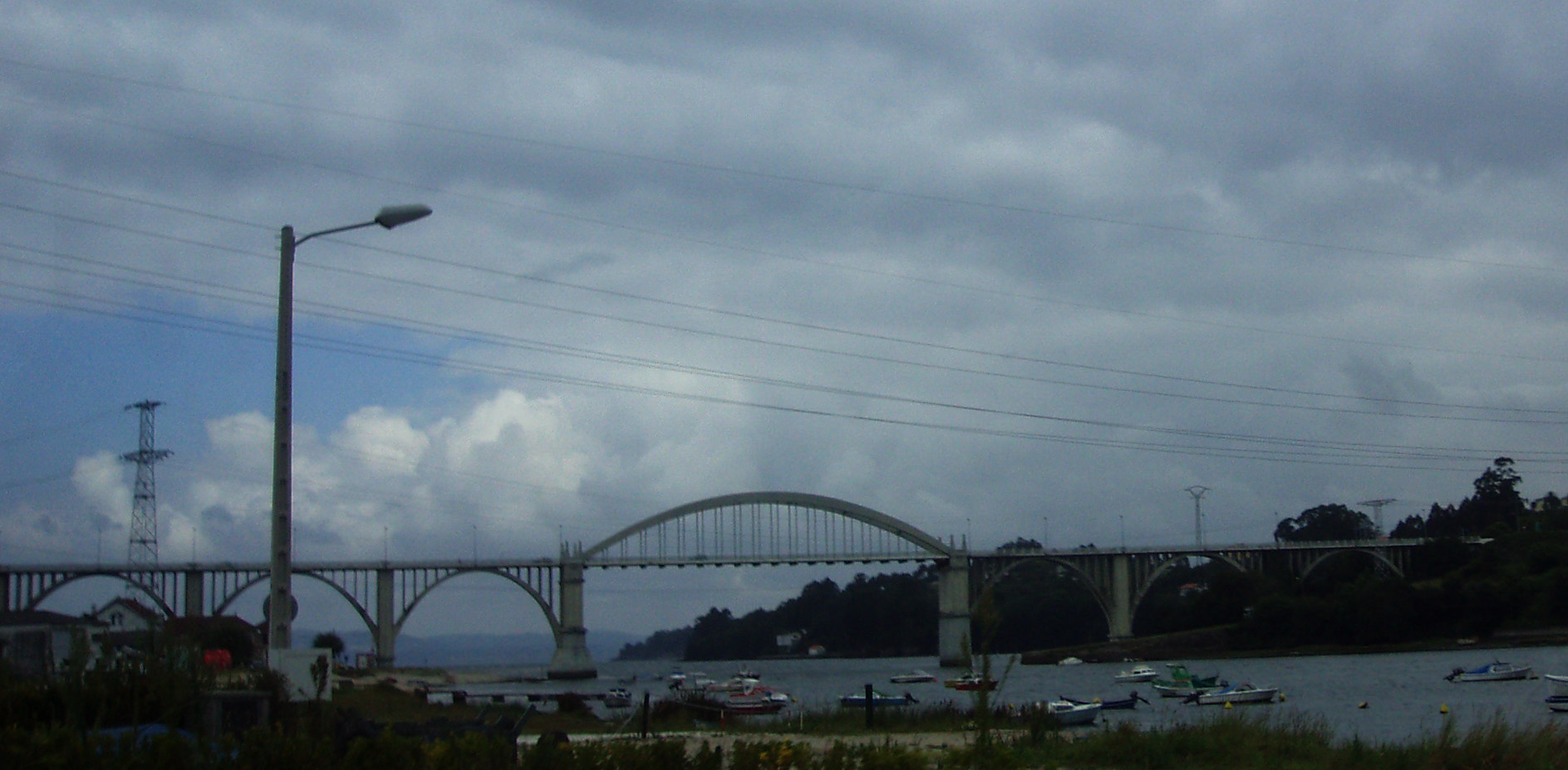 Vuela hasta este sitio / Fly to this location (Precisa / requires Google Earth ) Ver en GoogleMaps / See in GoogleMaps Puente construido en la bocana de la Ría de Betanzos, entre los años 1939 y 1942, por el prestigioso ingeniero Eduardo Torroja. El empleo de hormigón armado supuso una gran novedad en su momento, pues era la primera vez que se utilizaba este material por estas tierras para una obra de semejantes dimensiones. Lo más característico de este puente es un gran arco central que le confiere a la par delicadeza y majestuosidad. Desde el puente se contemplan espectaculares panorámicas de la ría; particularmente singulares son las nocturnas. turgalicia Se trata del ingeniero Eduardo Torroja Miret, considerado según se lee en la wikipedia el máximo especialista mundial en su época en construcciones de hormigón. Su hijo José Antonio Torroja Cavanillas, también destacado ingeniero (Premio Nacional de Ingeniería Civil en 2007), es el padre de Ana Torroja (Mecano). Leo en wikipedia una frase del padre: "He pasado a ser el hijo de mi padre al padre de mi hija" Eduardo Torroja Miret en wikipedia José Antonio Torroja Cavanillas en wikipedia Ana Torroja en wikipedia